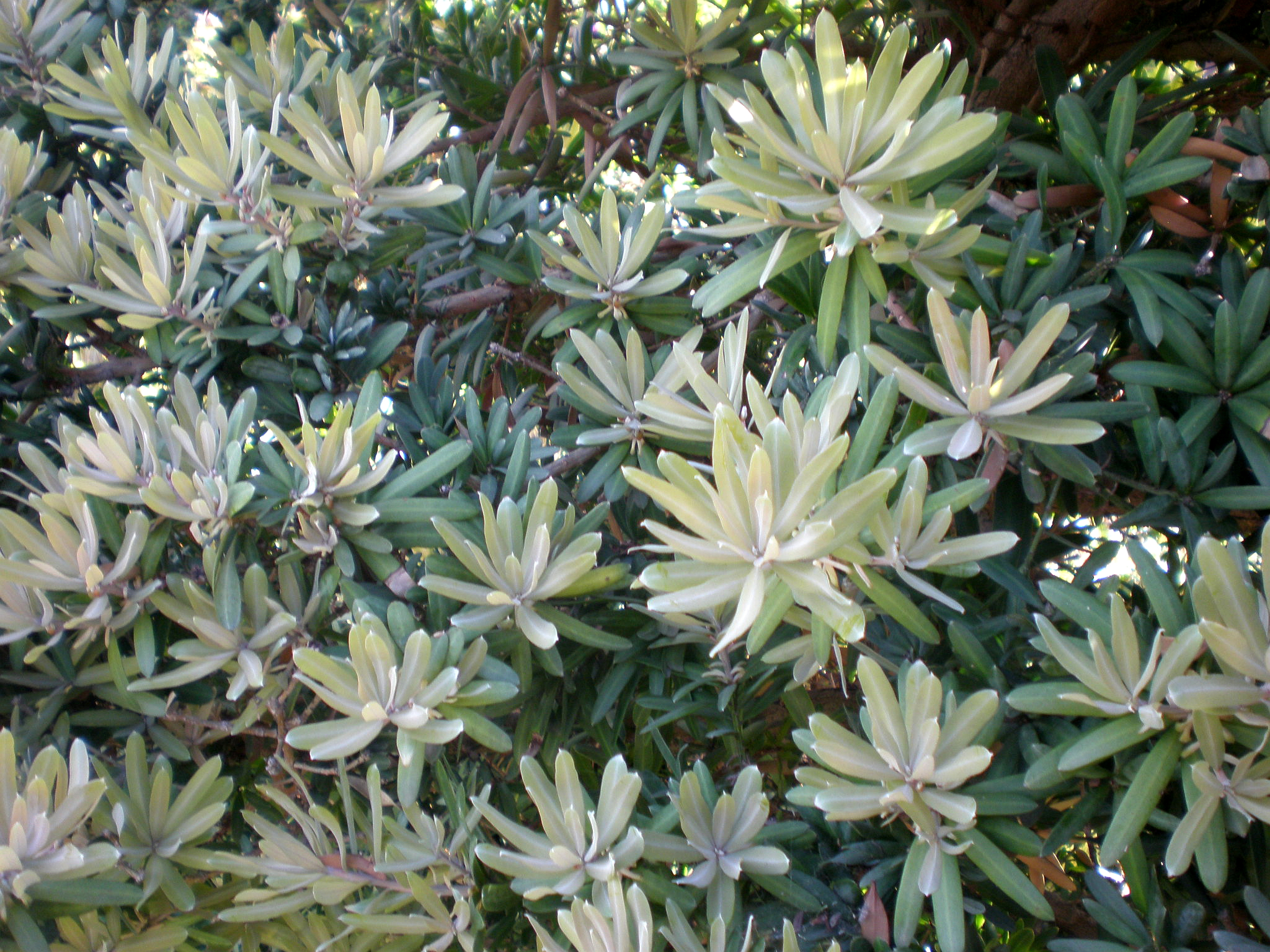 Jardín Botánico de Barcelona.